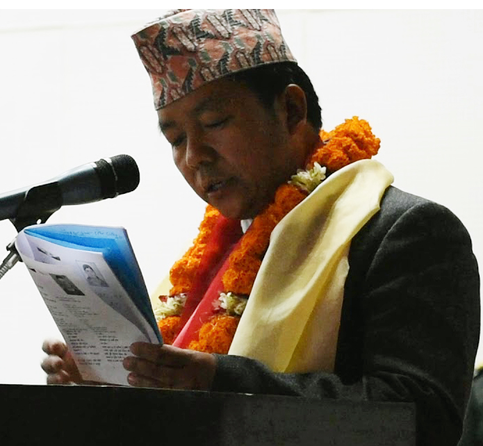 नेपाली: Chandra ranahanchha